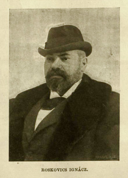 Рошкович Іґнац - портрет